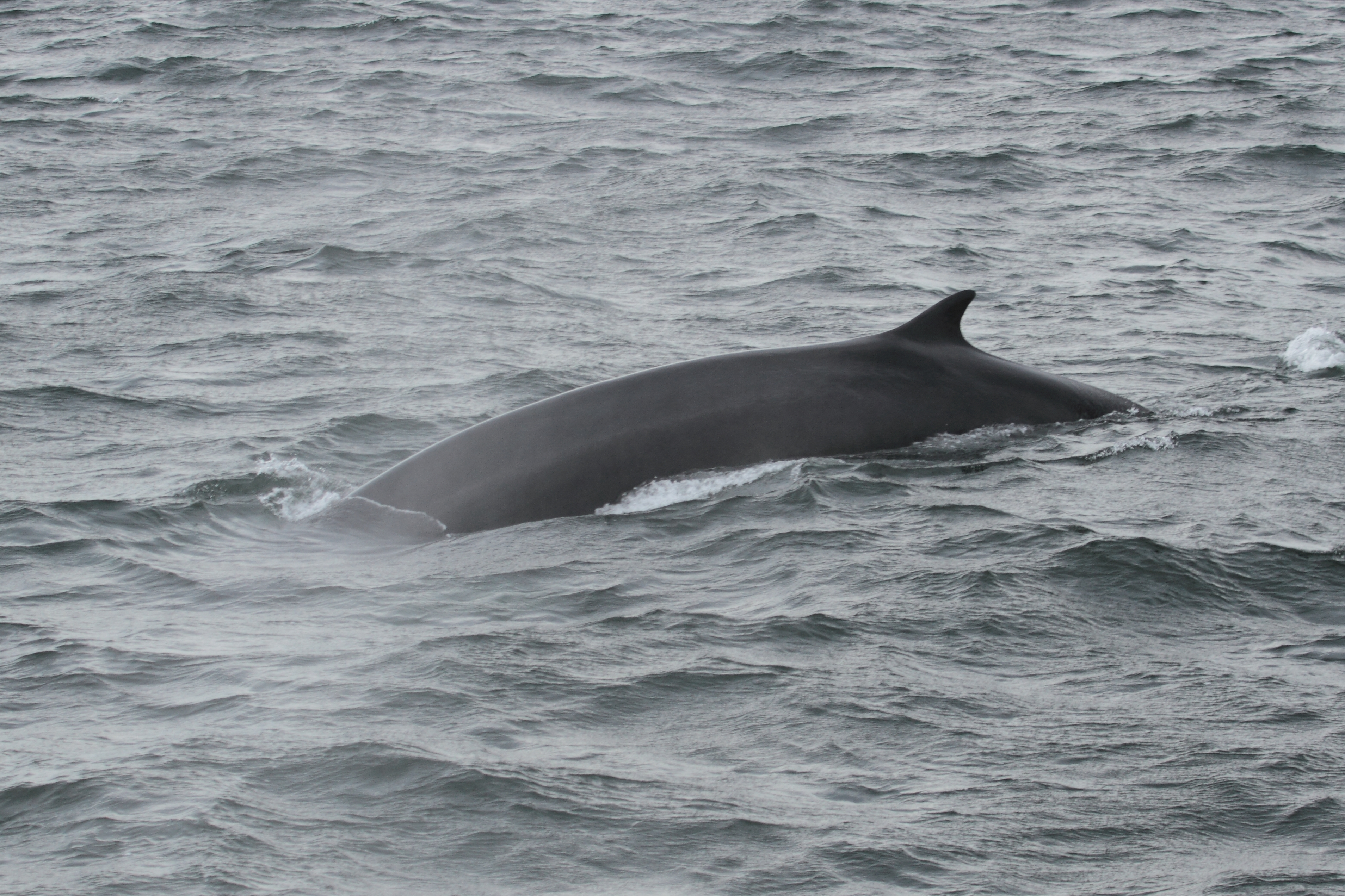 Rorqual commun, Parc marin du Saguenay–Saint-Laurent, Québec, Canada